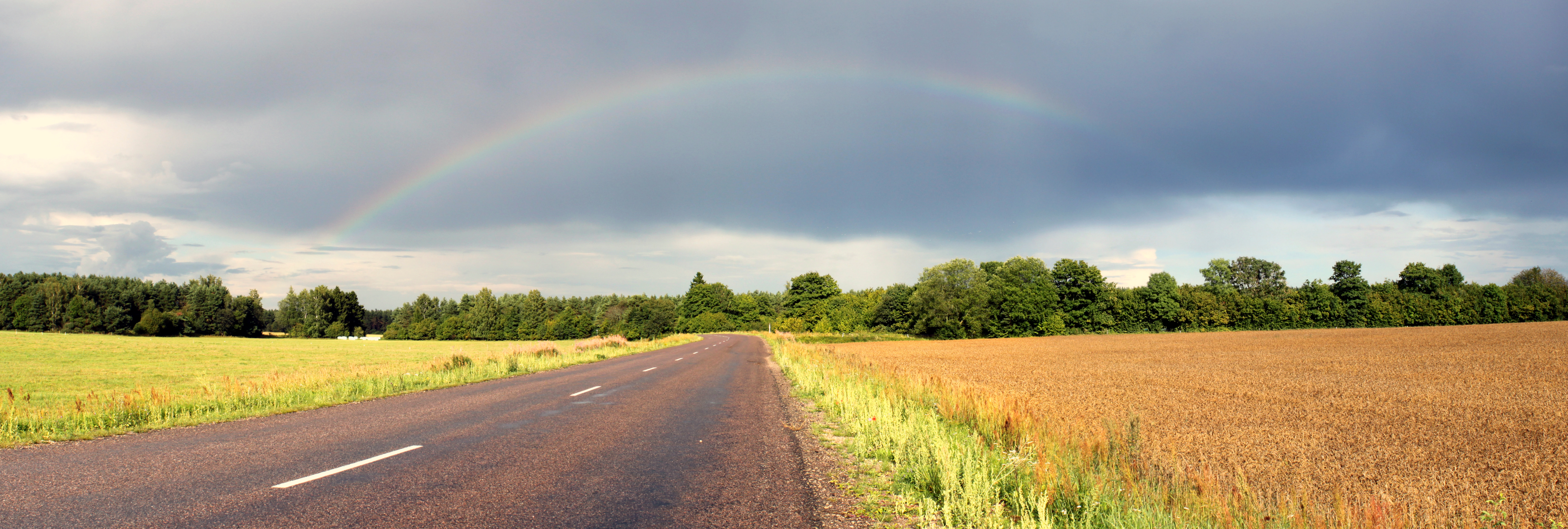 Asukoht: Räägi, Leisi vald, Saaremaa